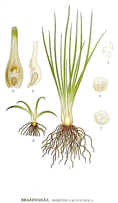 Original Description Braxengräs, Isoetes lacustris L.